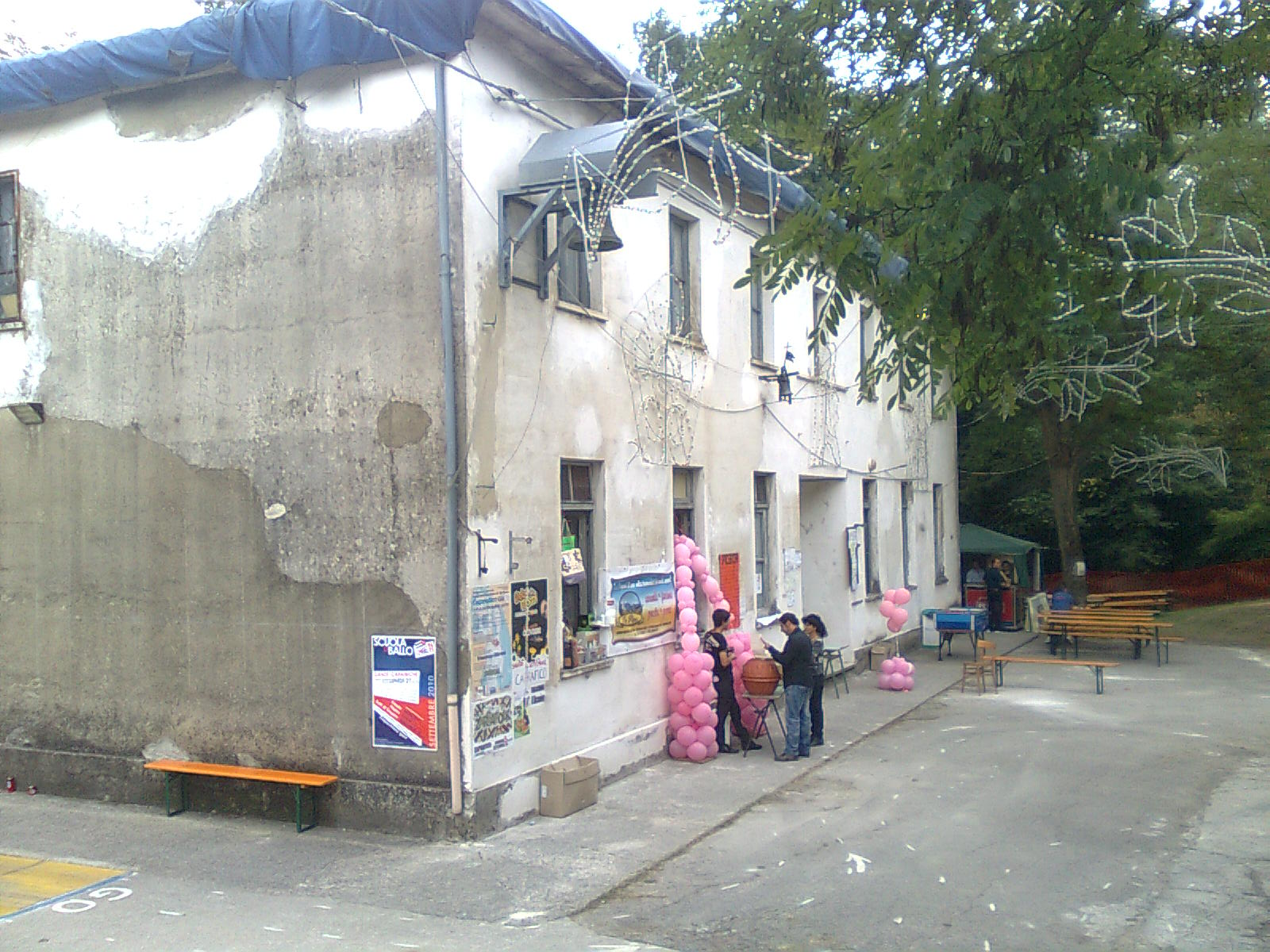 Chiesa della contrada di Caprafico durante la festa patronale